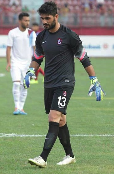 İbrahim Demir Trabzonspor altyapısında çıkma bir oyuncu.